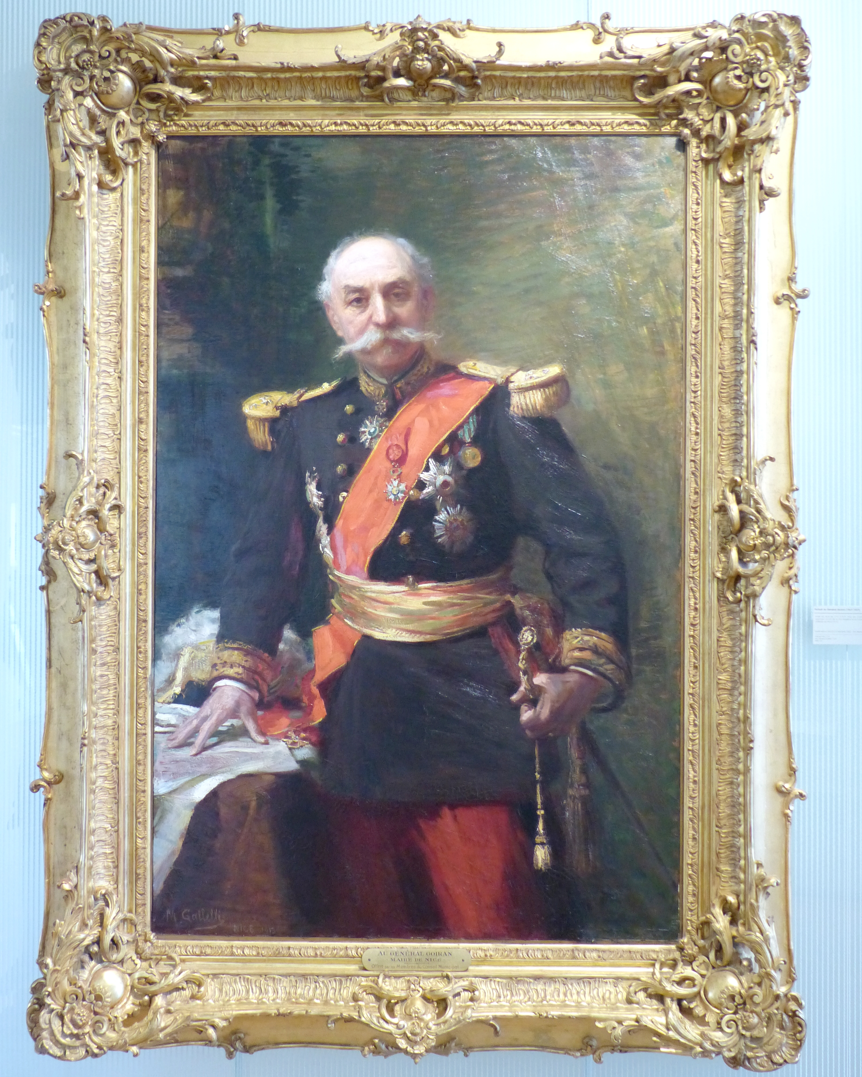 Nice (Alpes-Maritimes, France), sur la promenade des Anglais, la Villa (palais plutôt) Masséna, siège du musée du même nom. Portrait du général François Goiran en 1913, maire de Nice de 1912 à 1919, par Massimiliano Gallelli.